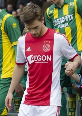 Joël Veltman